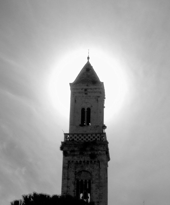 Modugno, Puglia, Italia